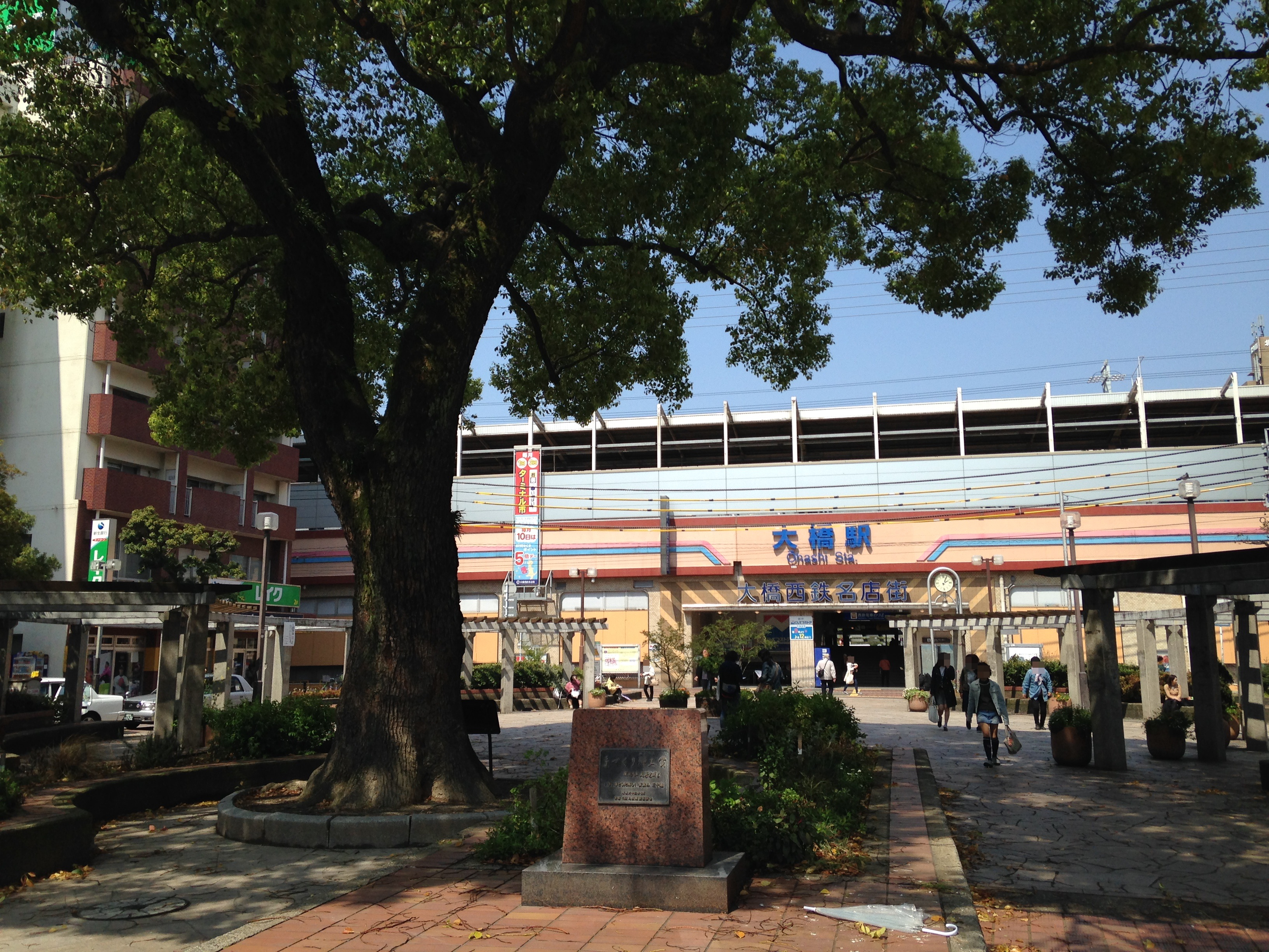 大橋駅(福岡県)西口の遠景